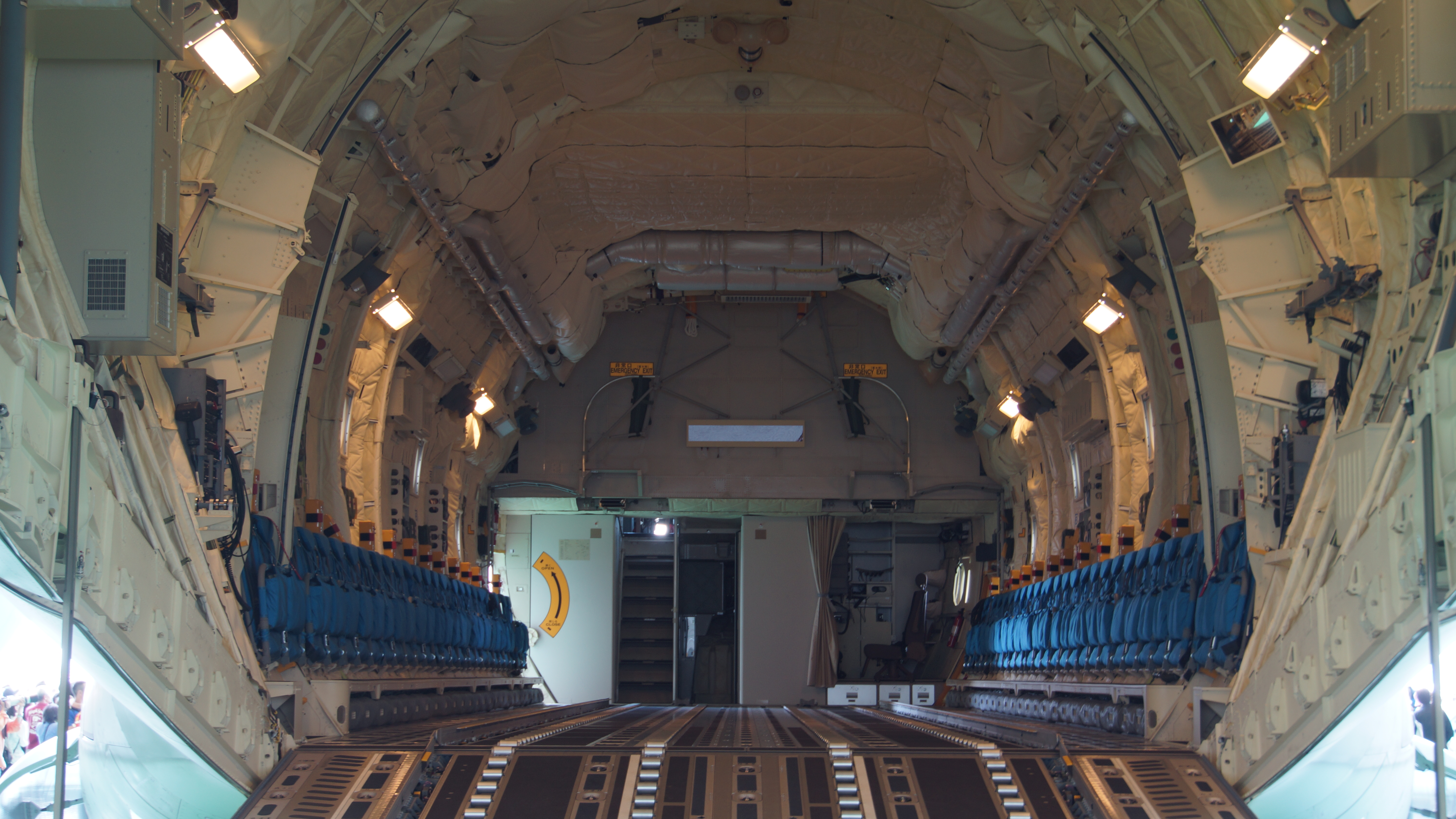 航空自衛隊 C-2輸送機（68-1203号機） 貨物室 後面。2017年5月28日 美保基地にて。